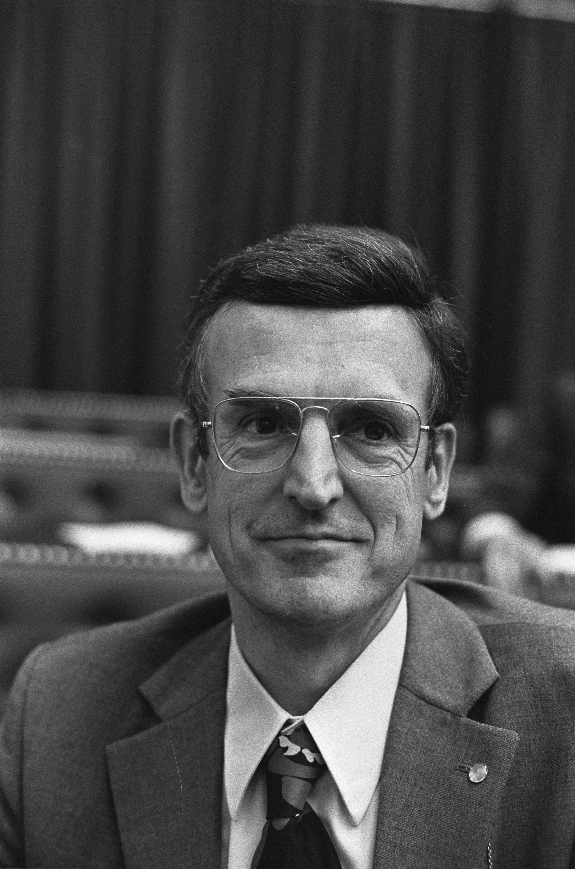 Collectie / Archief : Fotocollectie Anefo Reportage / Serie : [ onbekend ] Beschrijving : Tweede Kamer, Drees jr. Datum : 29 augustus 1973 Locatie : Den Haag, Zuid-Holland Trefwoorden : kamerleden, politiek, portretten Persoonsnaam : Drees, Willem (jr.) Fotograaf : Mieremet, Rob / Anefo Auteursrechthebbende : Nationaal Archief Materiaalsoort : Negatief (zwart/wit) Nummer archiefinventaris : bekijk toegang 2.24.01.05 Bestanddeelnummer : 926-6454